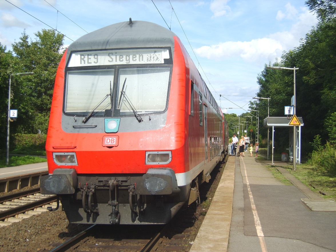 Bahnhof Nothberg